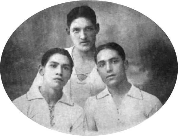 Fotografia dels germans Martí, jugadors del Granollers Foot-ball Club.